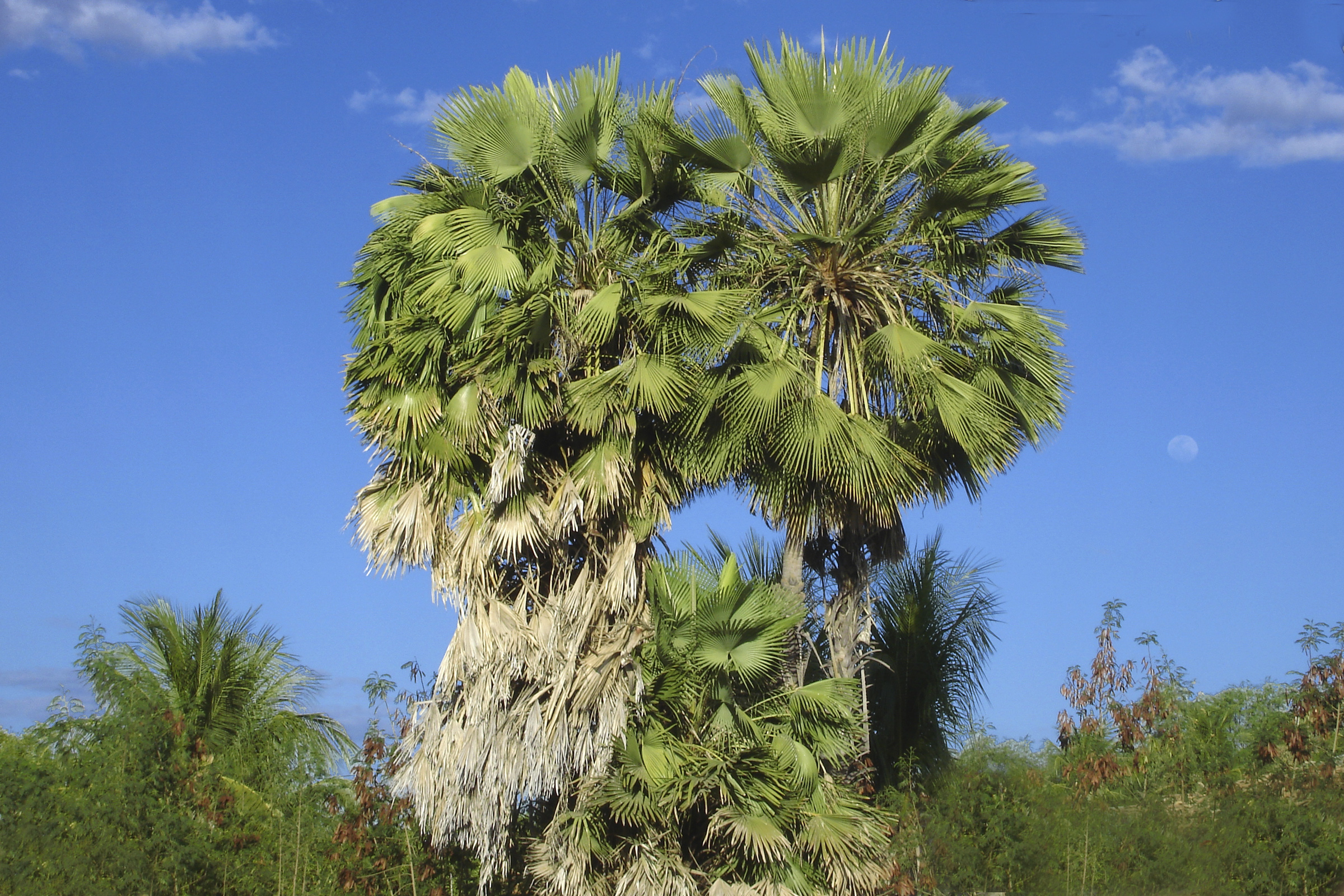 Carnaúba do tupi árvore do caraná. Palmeira-símbolo do estado do Piauí, das suas folhas é extraída a matéria-prima para a fabricação de cera de lustrar - São Miguel do Tapuio - Piauí - Brasil